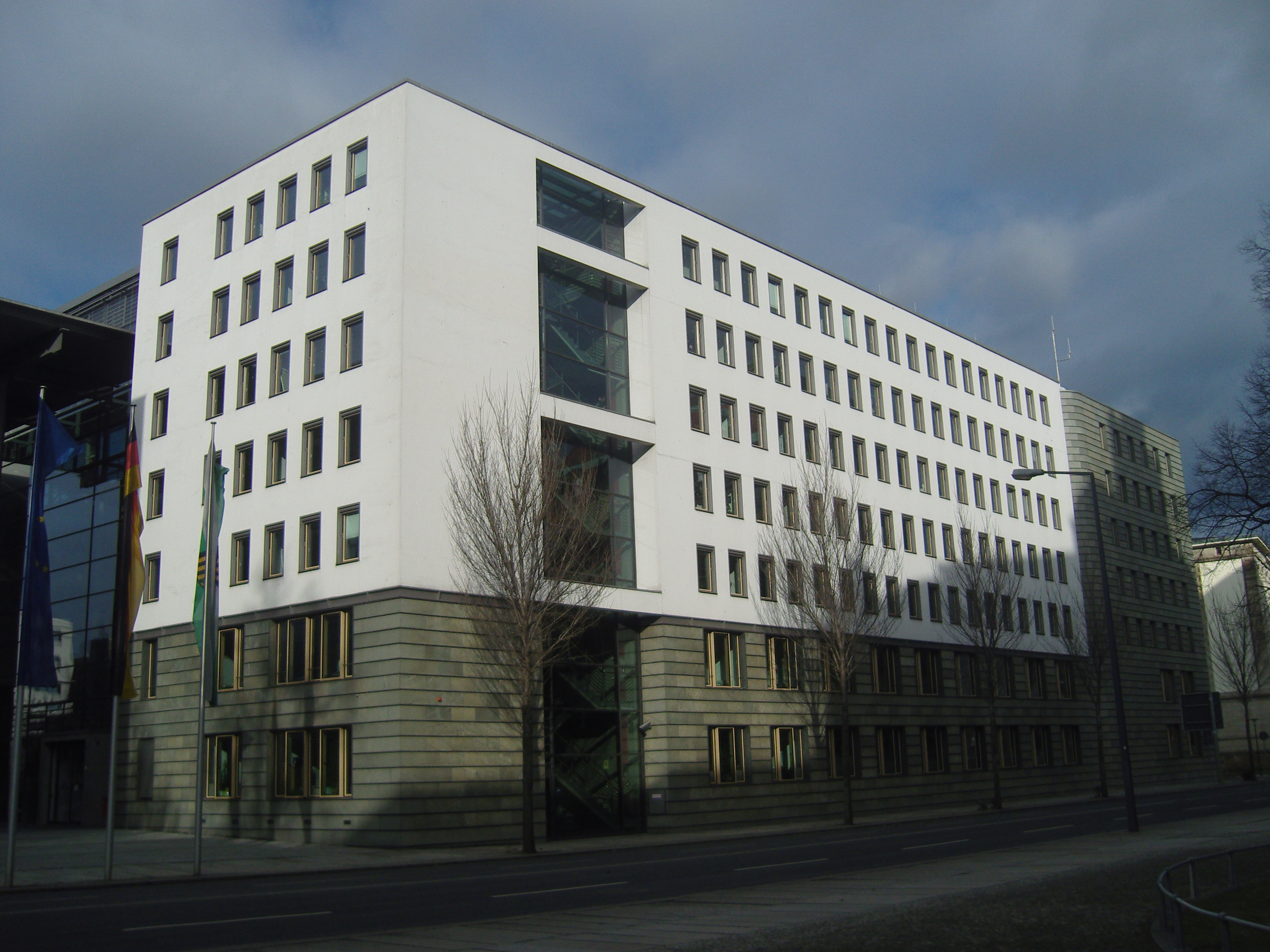 Gebäude des Sächsischen Staatsministerium des Innern